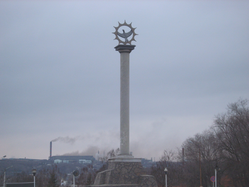 Автор проекта – главный архитектор города В. Горелкин. Название – «Часы жизни». Идея создания основывалась на физическом явлении солнечных и лунных часов и смысловой отсчёт исторического времени.